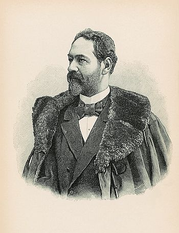 Harrach József magyar zeneesztéta, zenetörténész, tanár.